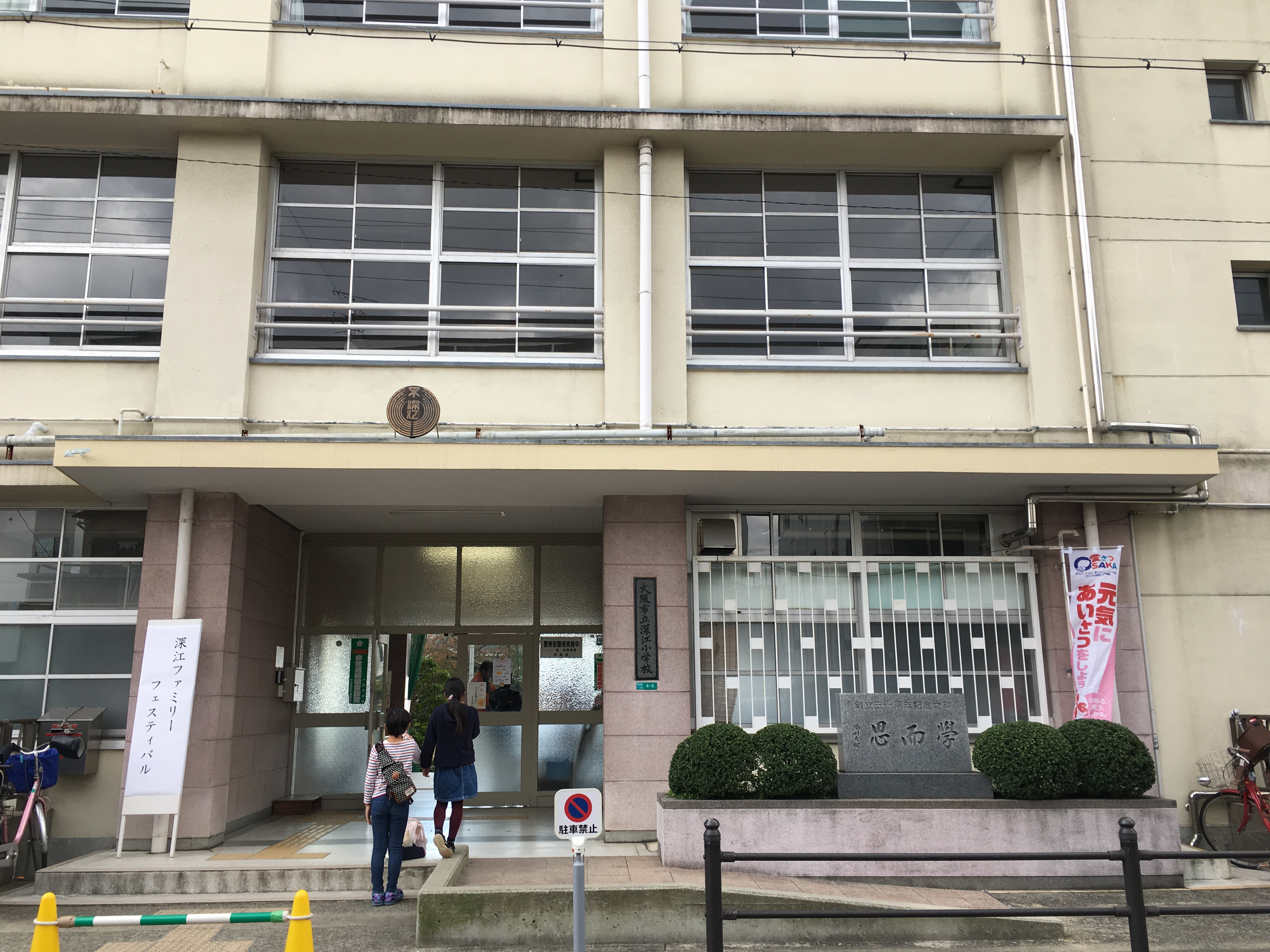 大阪市立深江小学校